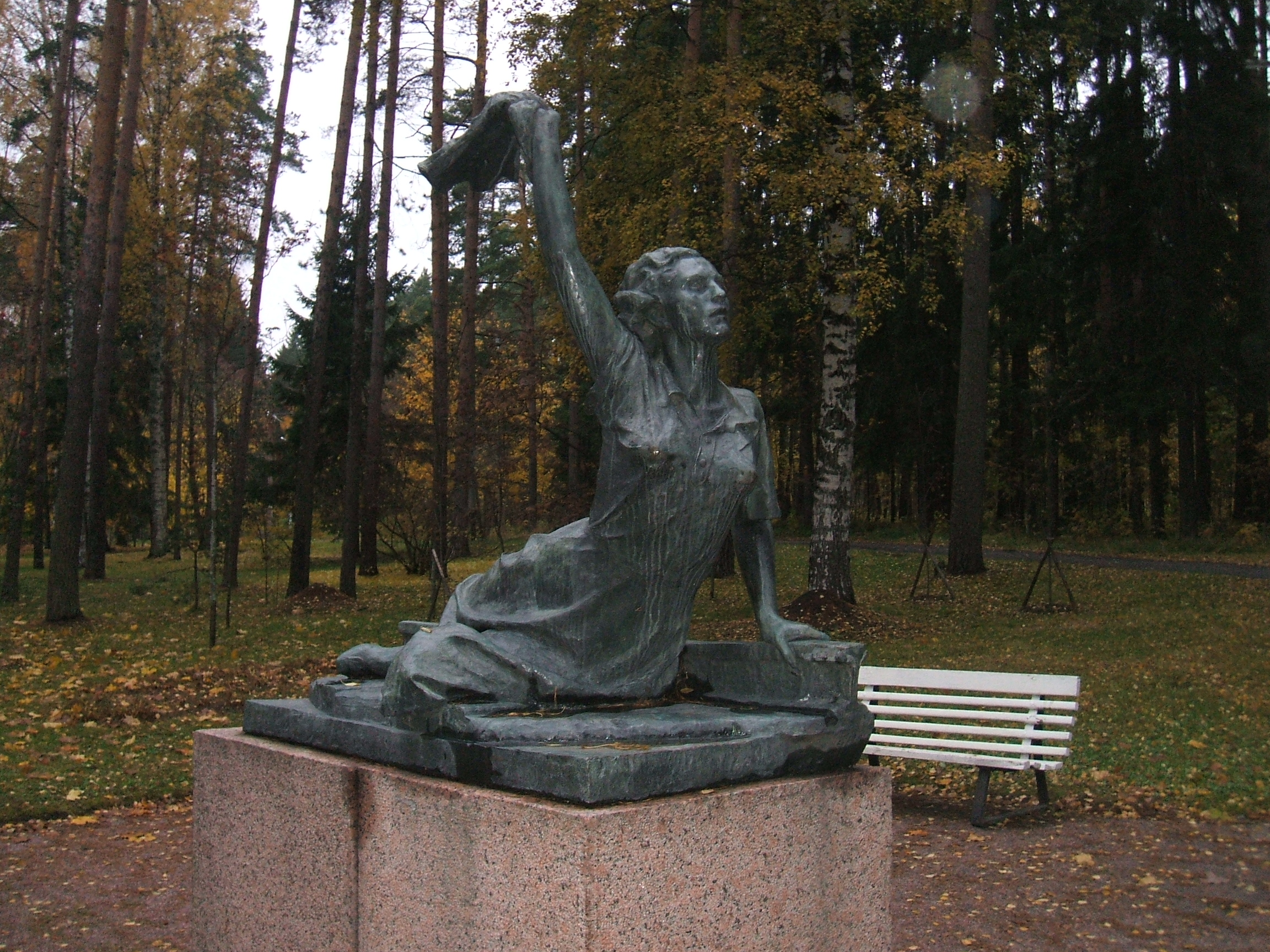 Памятник французской коммунистке, протестовавшей против войны во Вьетнаме. Женщины легли на рельсы перед эшелоном с оружием в 1950 г.